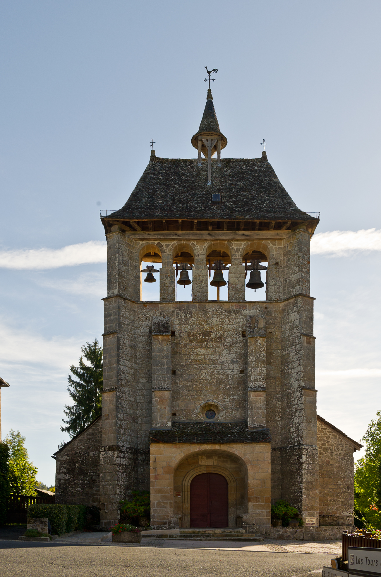 Église Saint-Cyr-Sainte-Julitte de Saint-Cirgues-la-Loutre, (Inscrit, 1928)